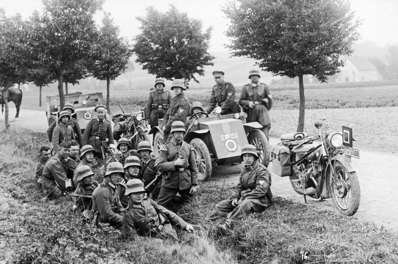 Bei Bad Pyrmont, Feldmanöver der Reichswehr Feldmanöver der 6. Division bei Bad Pyrmont 1930, 2. Kompanie Kraftfahrer Abt. 6 und 2. Kompanie Pionier-Bataillon 6